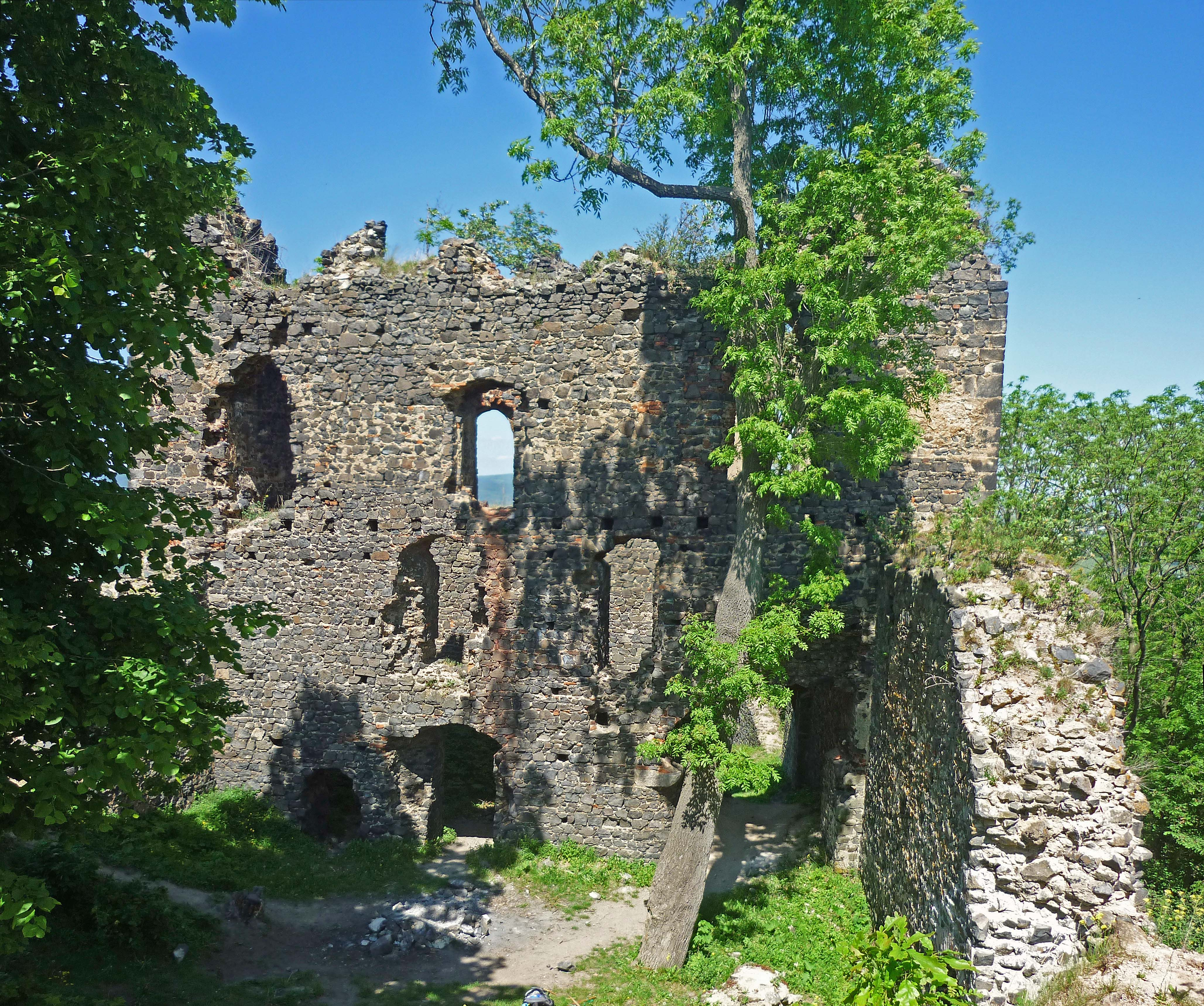 Burgruine Egerberg (Egerburg) bei Klösterle an der Eger (Klášterec nad Ohří)